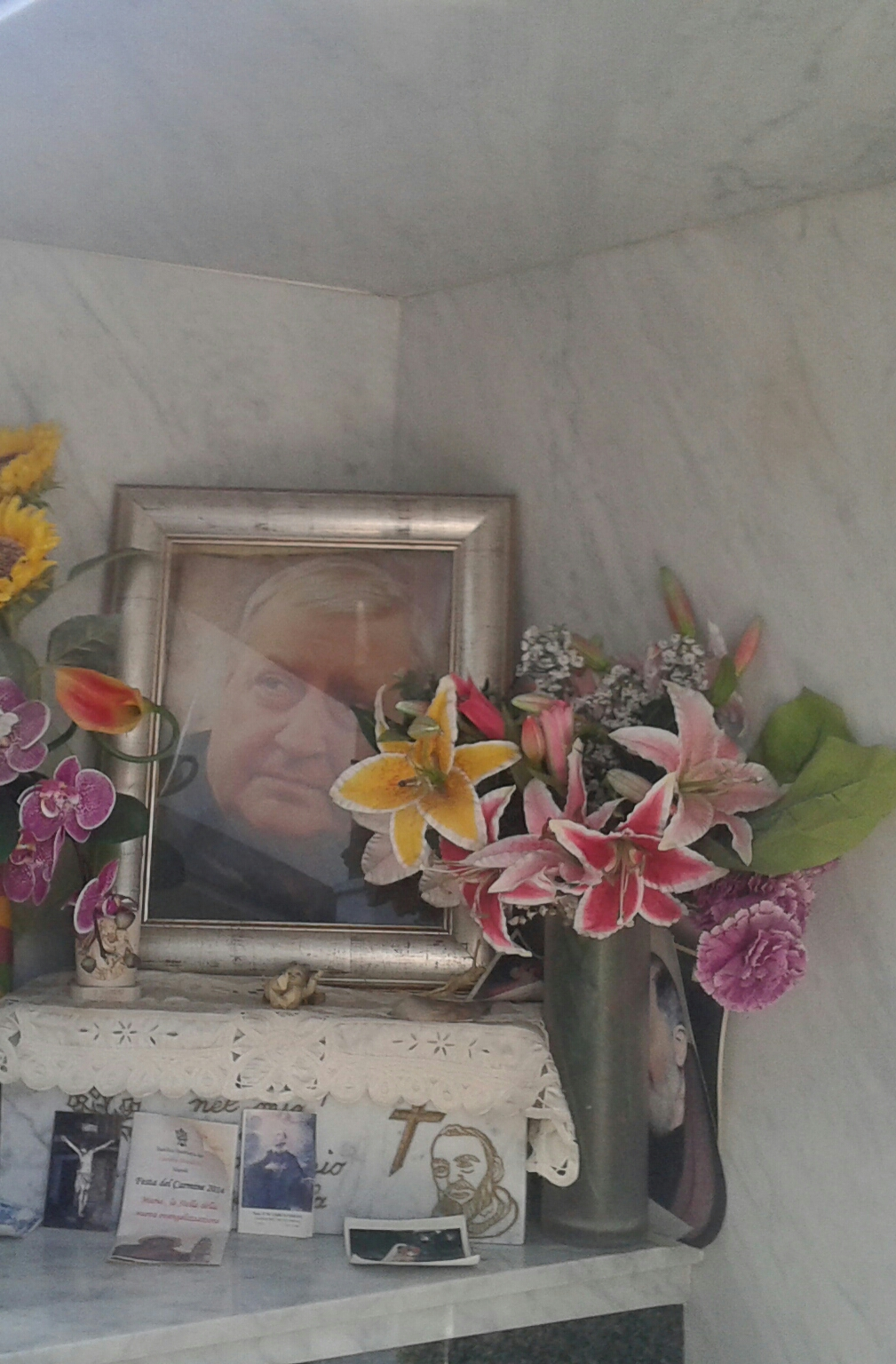 La Tomba di Mario Merola nella cappella privata di Gigi D'Alessio. Foto scattata da me il 9 luglio 2017 nel cimitero di Poggioreale a Napoli.